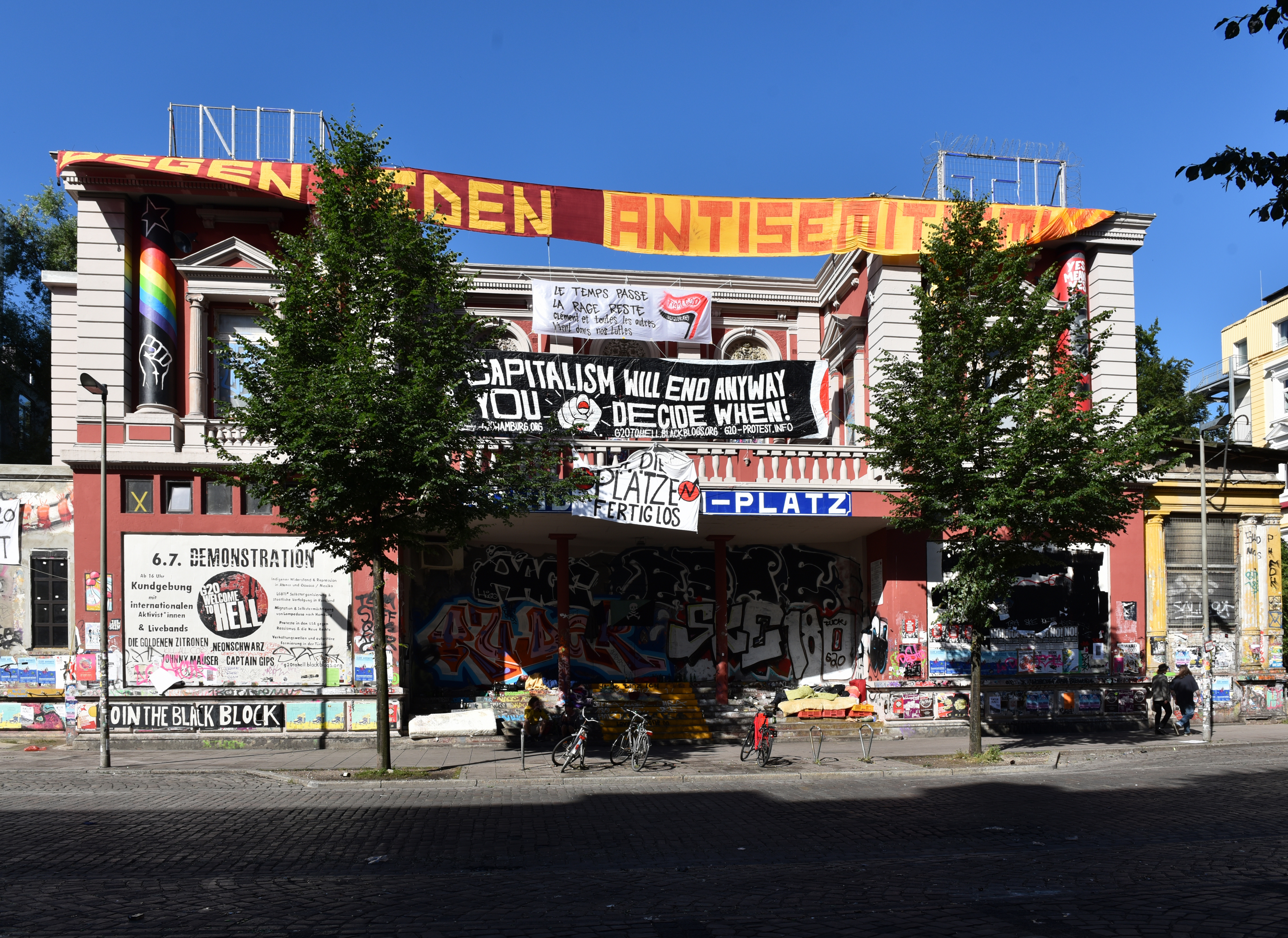 G-20 die Rote Flora nach der dritten Kravallnacht